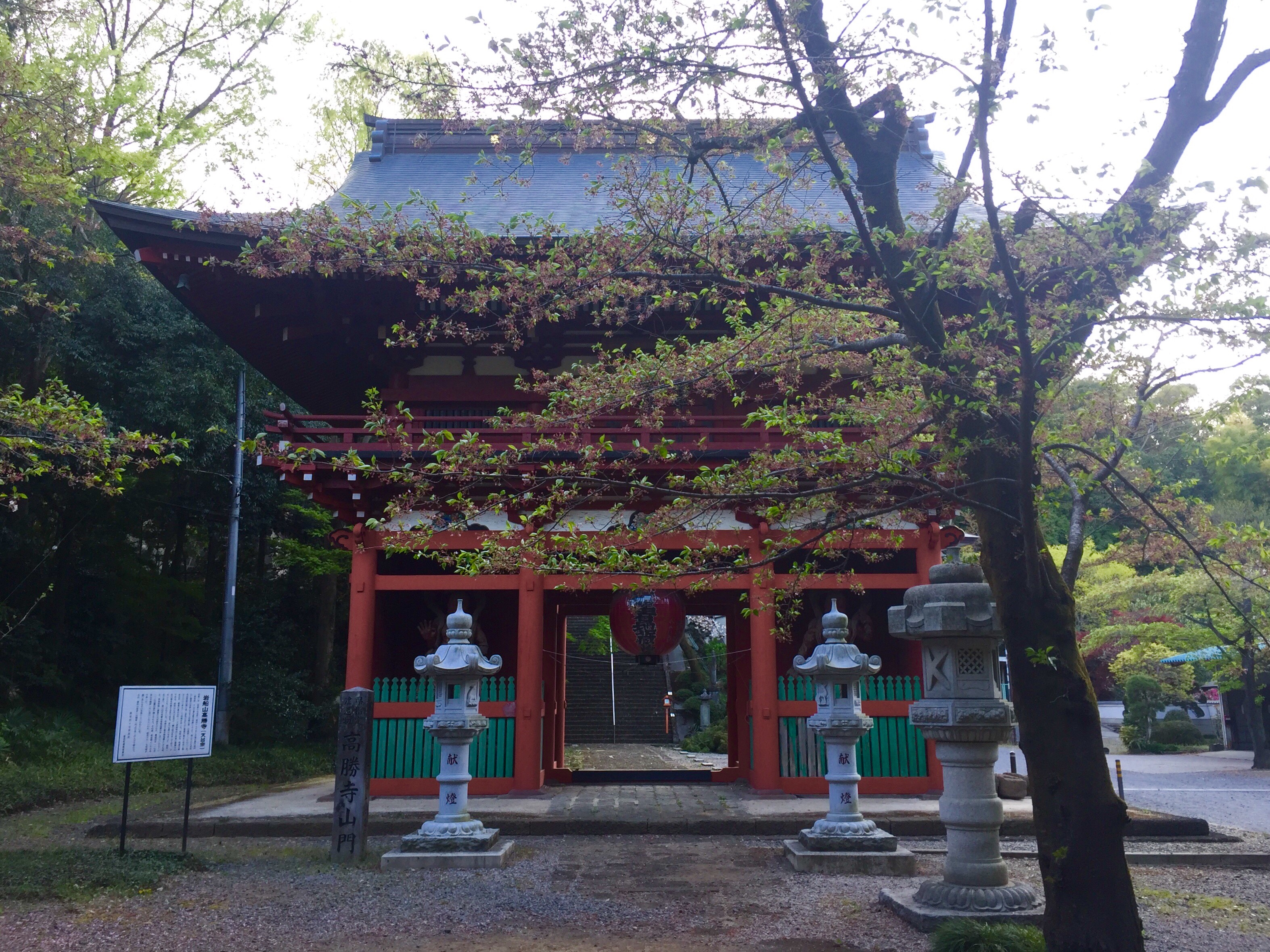 栃木県栃木市岩舟町にある、岩船山高勝寺山門。